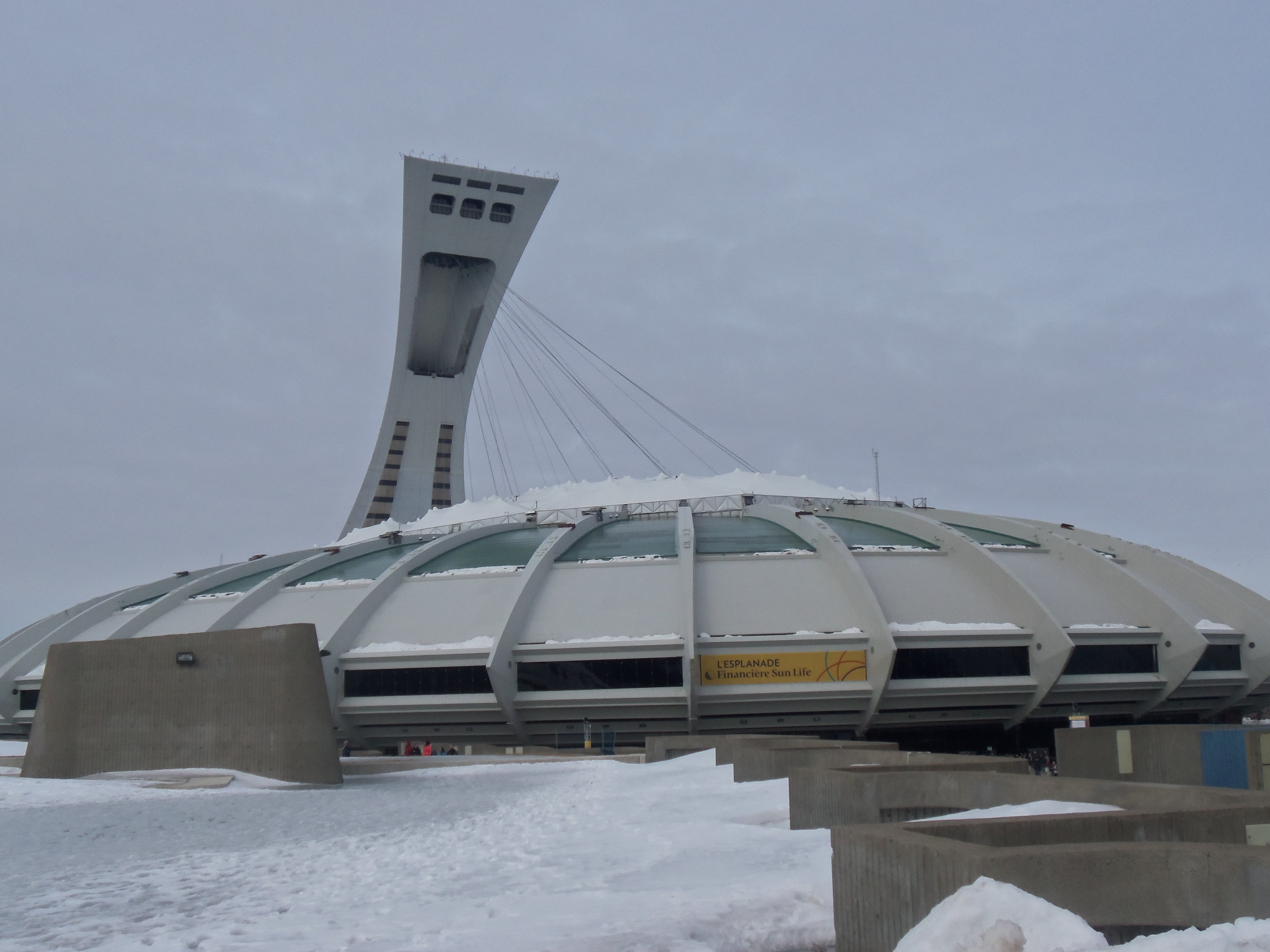 Mercier-Hochelaga-Maisonneuve, Montreal, QC, Canada